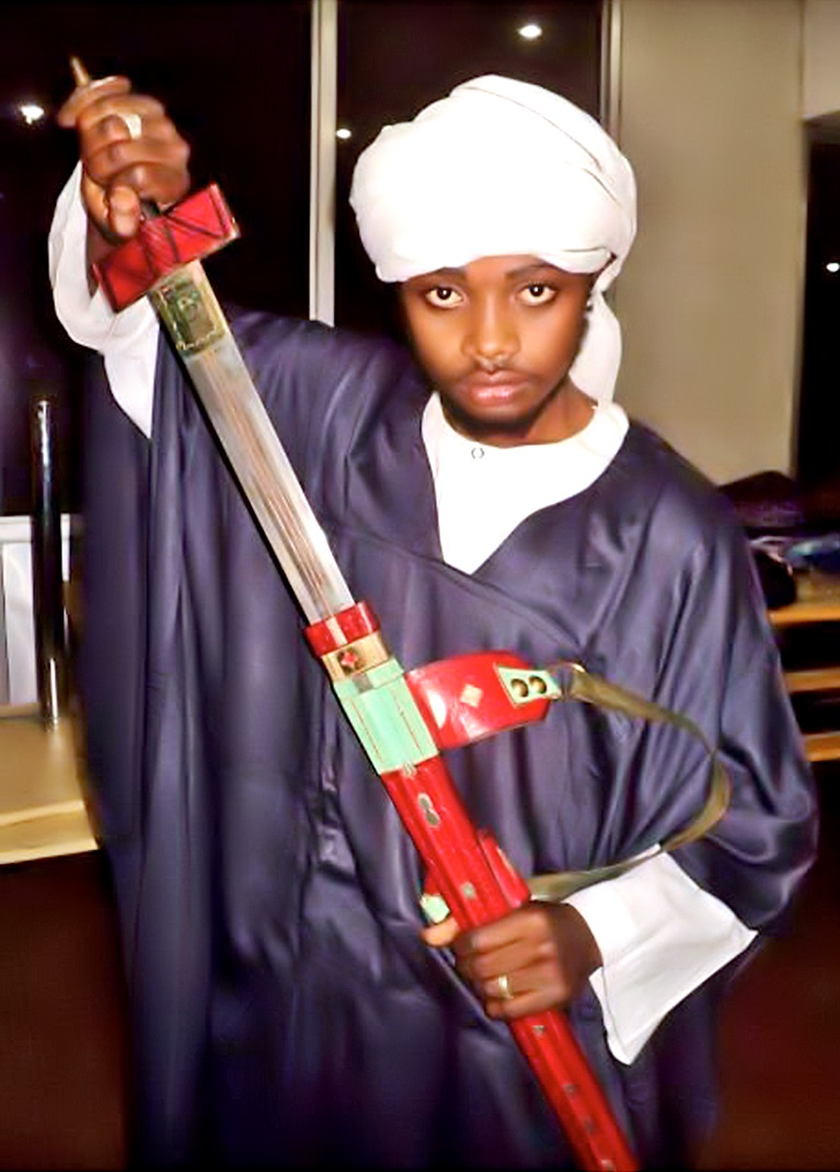 le jeune de la culture malienne samata cissé